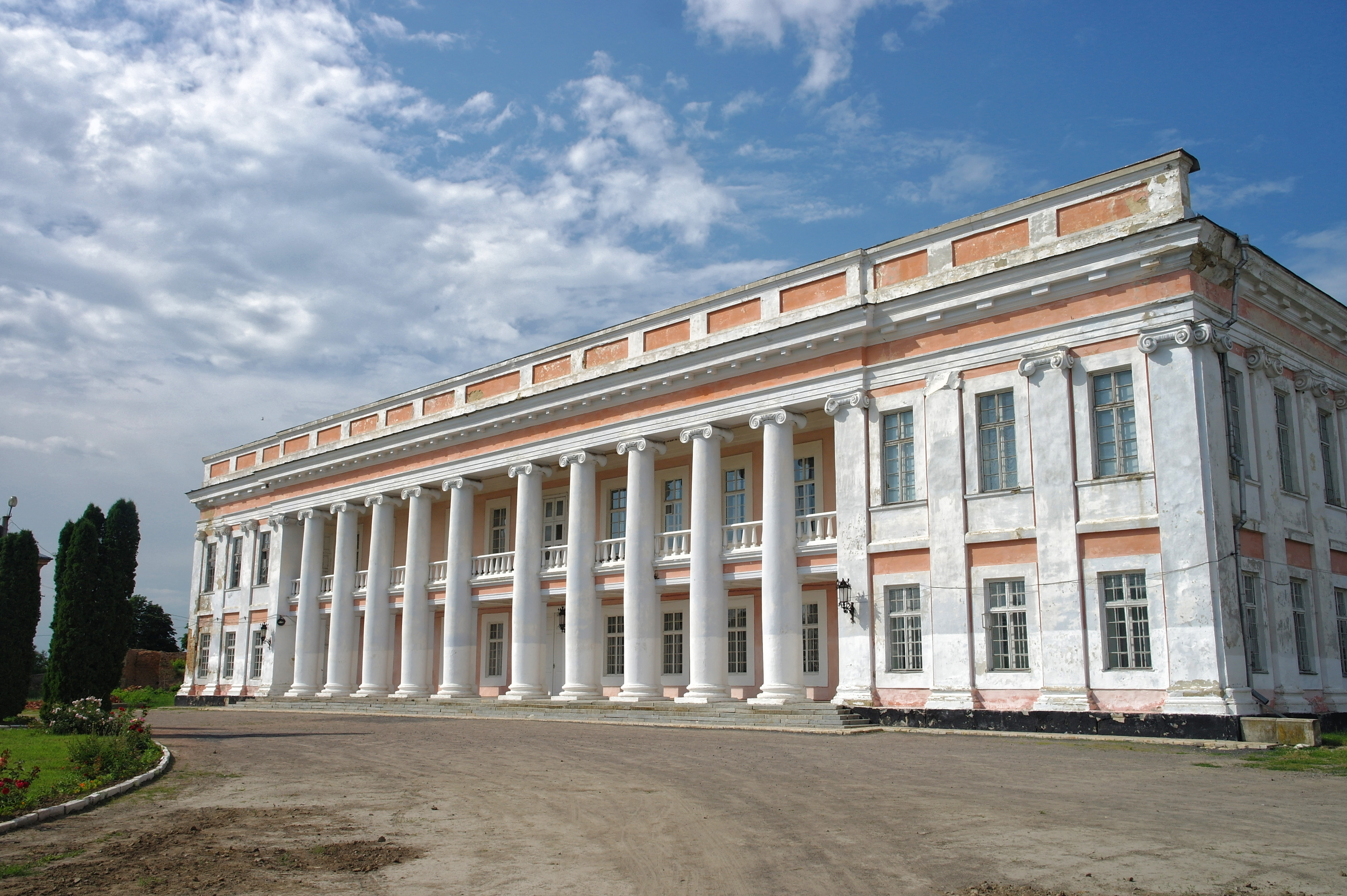 Тульчин, палац Потоцького